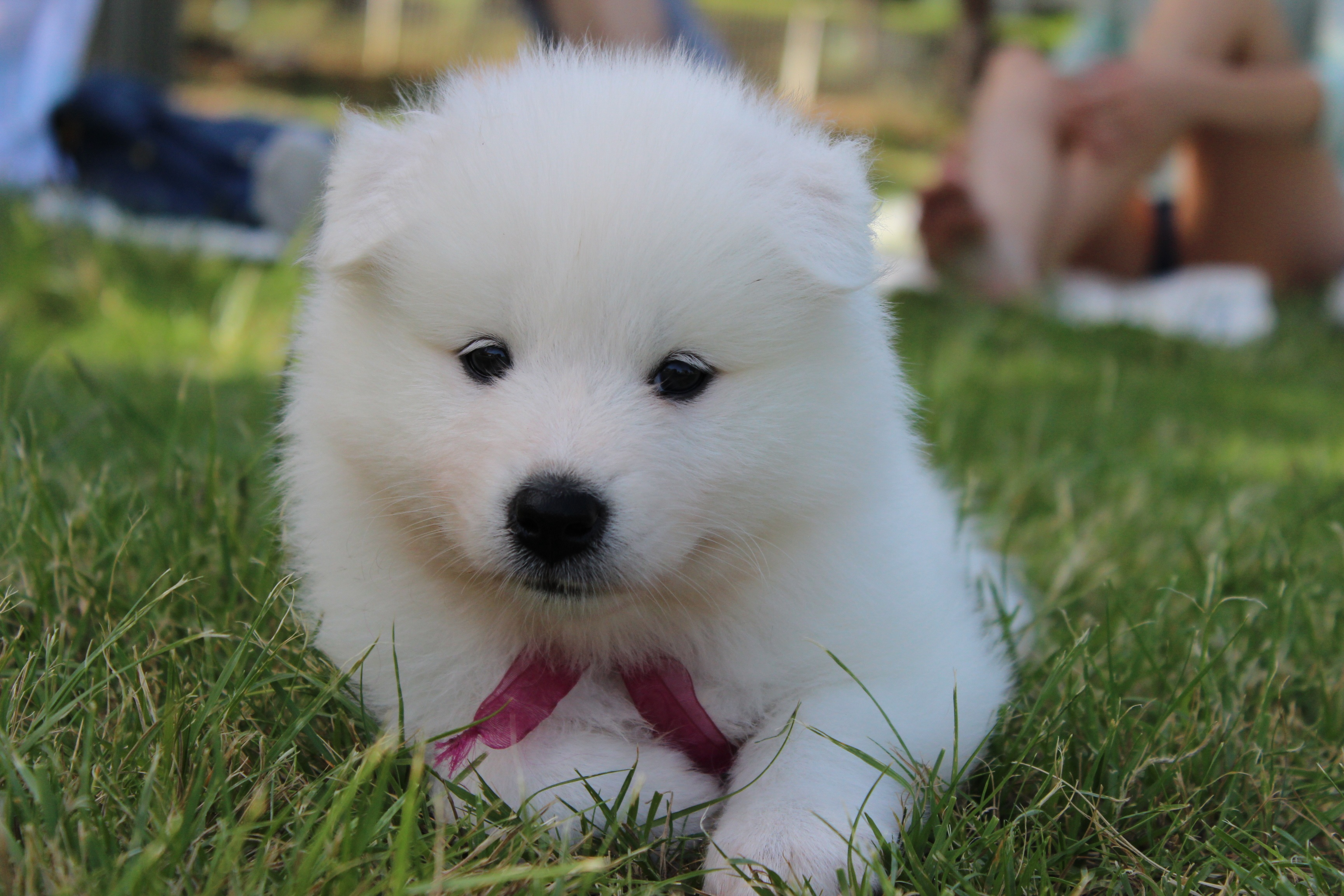 Щенок самоеда